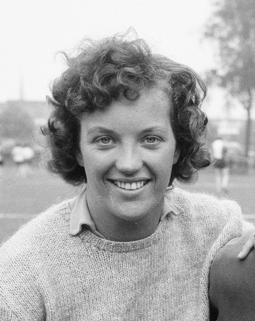 Atletiek te Rotterdam, Nel Zwier